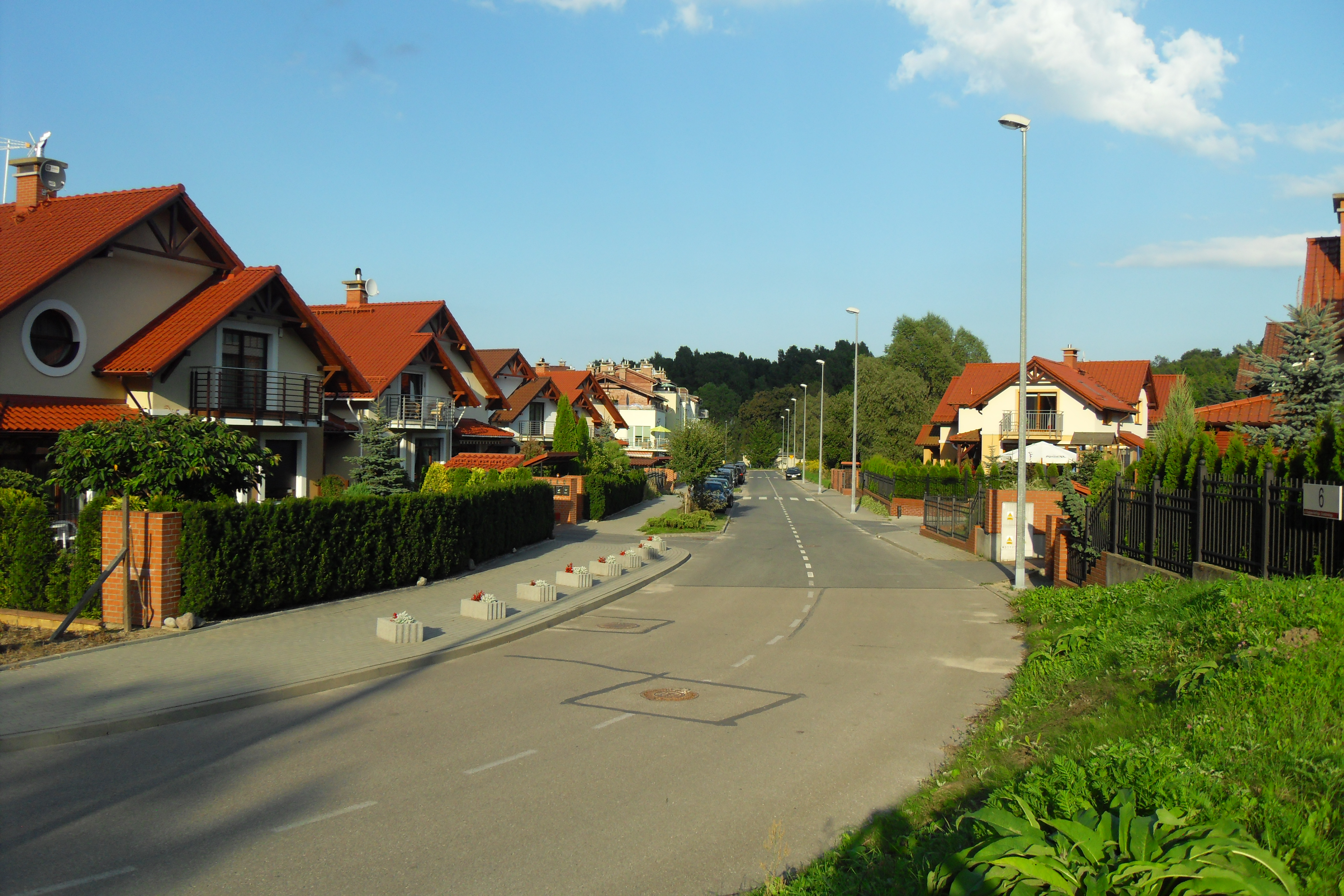 Gdańsk Brętowo, ul. Herlinga-Grudzińskiego.